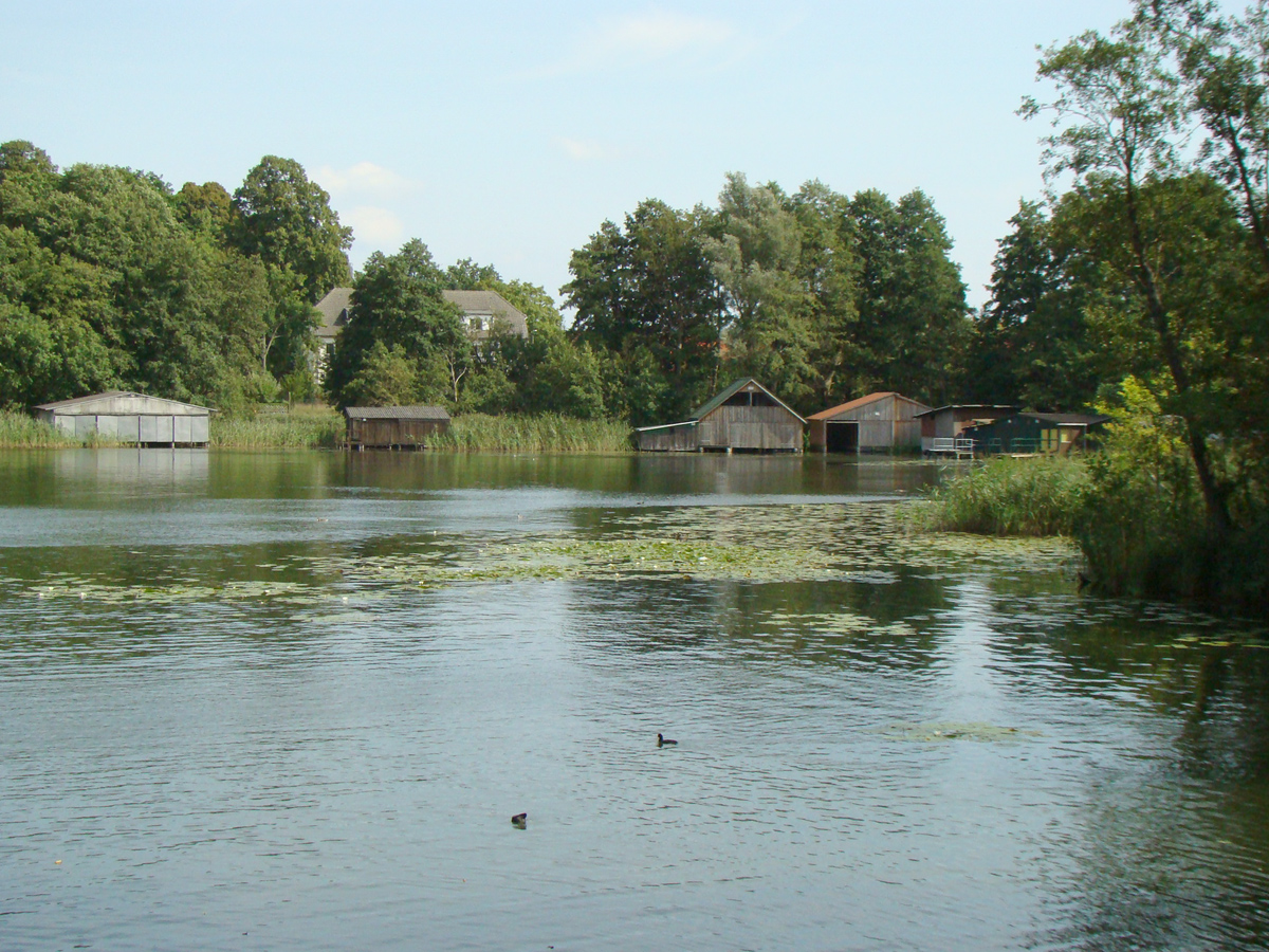 Mirower See